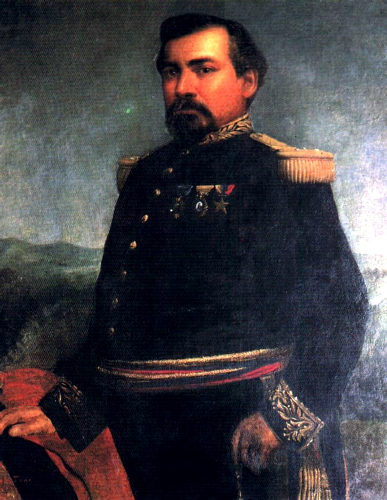 Jose Desiderio Trias. Oleo/ Tela. Minsterio de Relaciones Exteriores. Caracas Venezuela